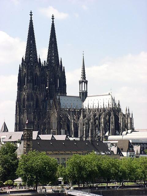 Kölner Dom